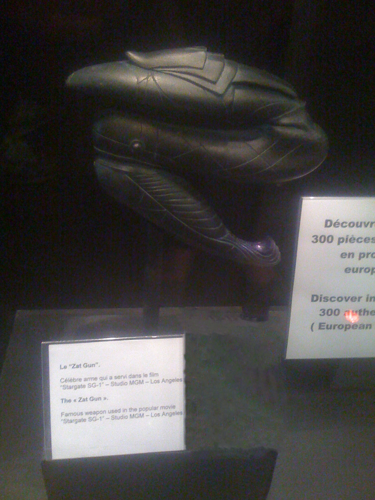 Un Zat'nik'tel original de la série Stargate SG-1, au Musée des miniatures et décors de cinéma de Lyon.